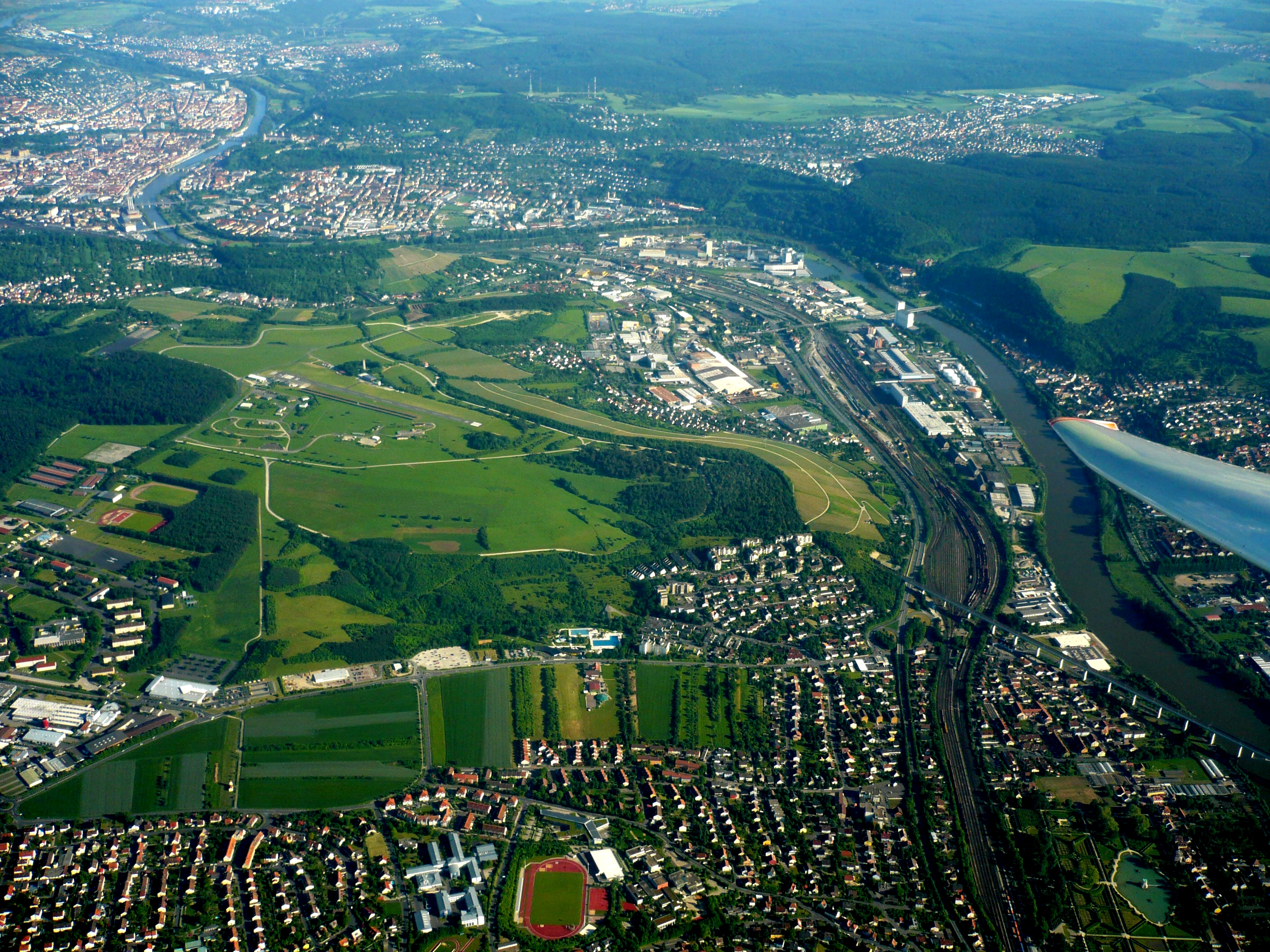 Der Verkehrslandeplatz Würzburg-Schenkenturm (EDFW) vom Norden aus gesehen.